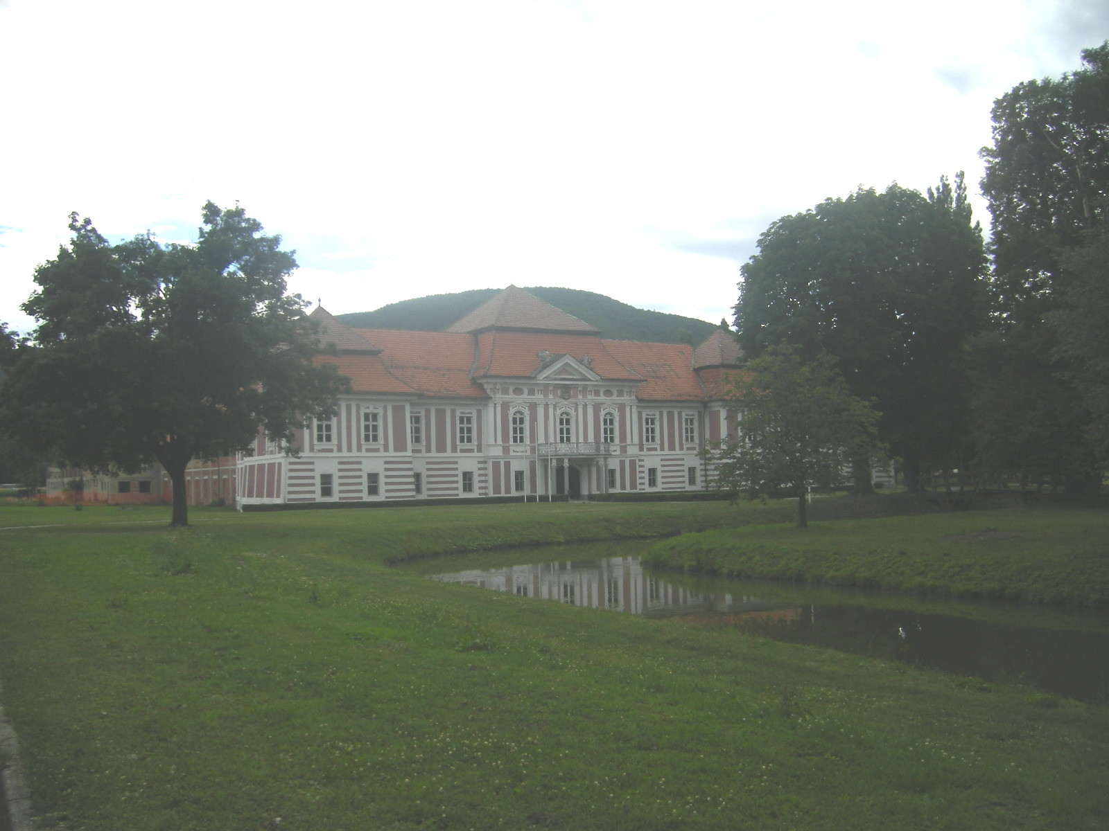 Betnava Castle (Maribor municipality)